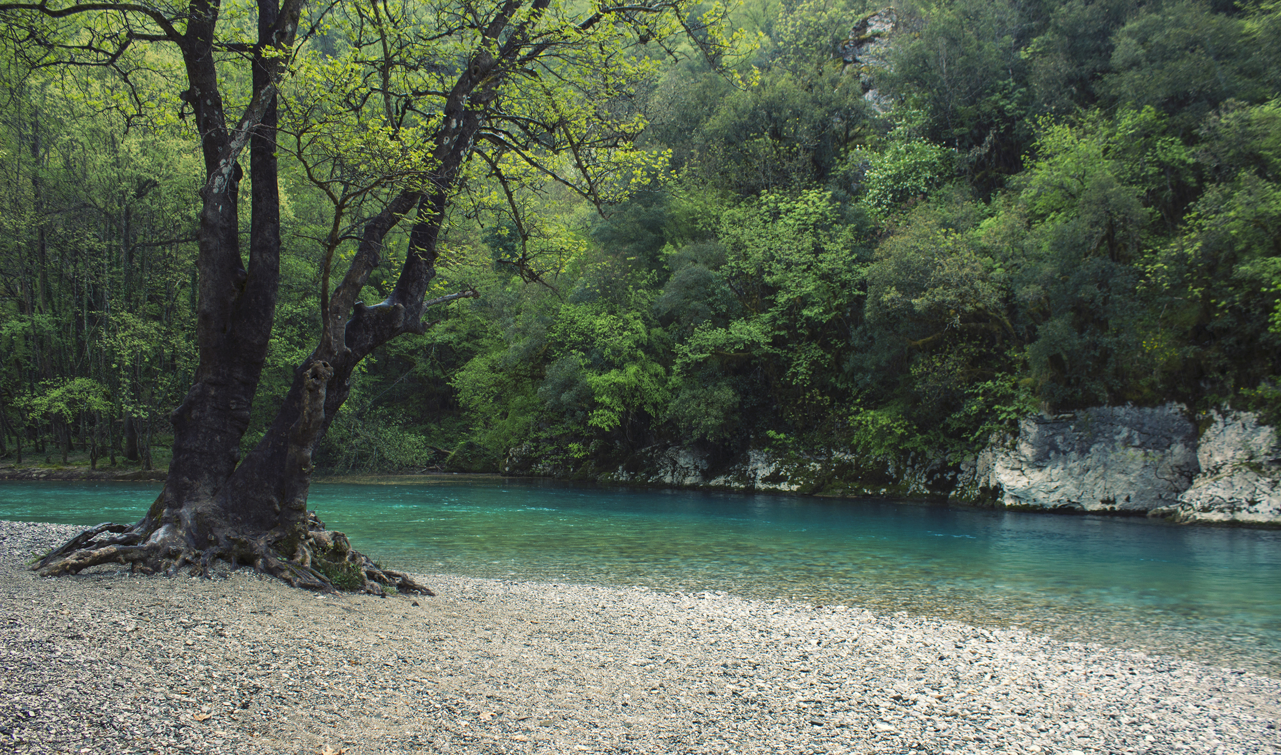 Ο Βοϊδομάτης, στο δρόμο για Μικρό Πάπιγκο. This is a photography of Natura 2000 protected area with ID GR2130001